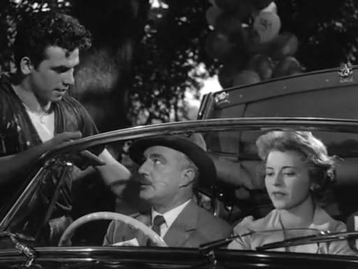 Scena del film